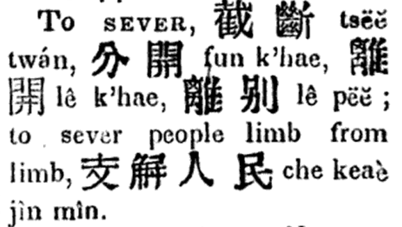 English and Chinese dictionary (part of)